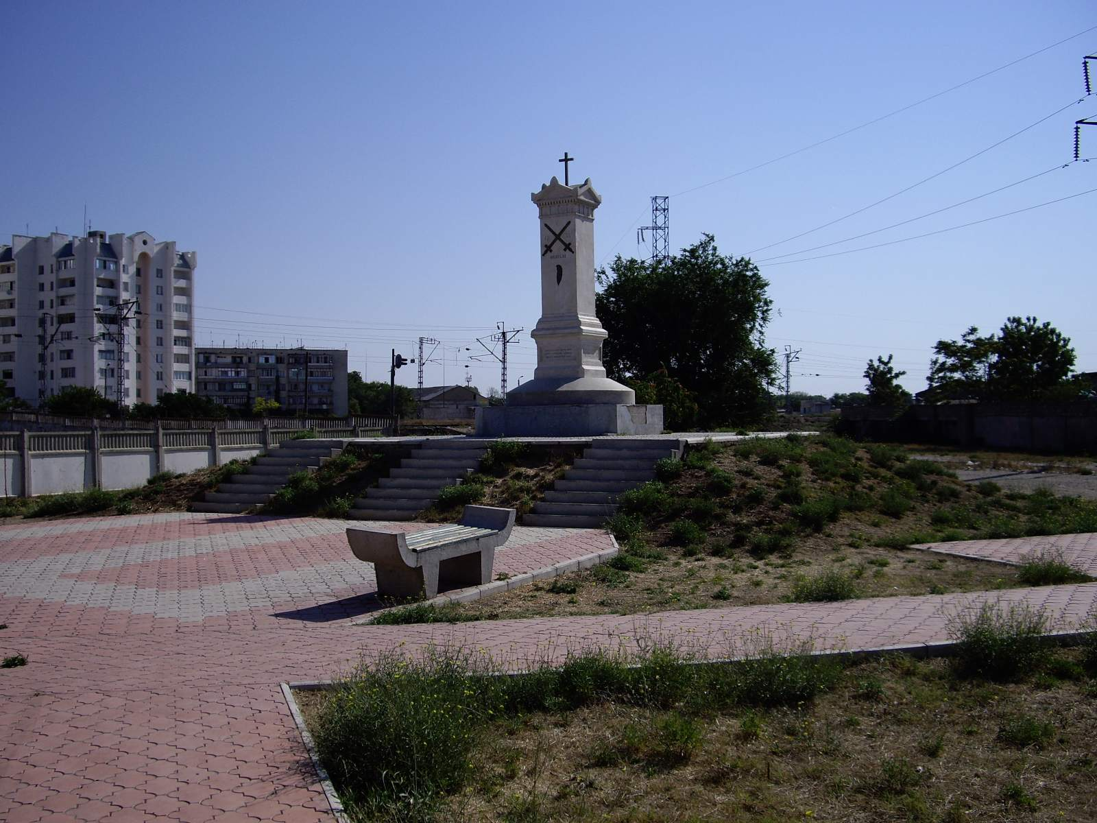 Штурм Евпатории. Храбрымъ защитникамъ веры, царя и отечества, павшим здесь 5 февраля 1855 года.